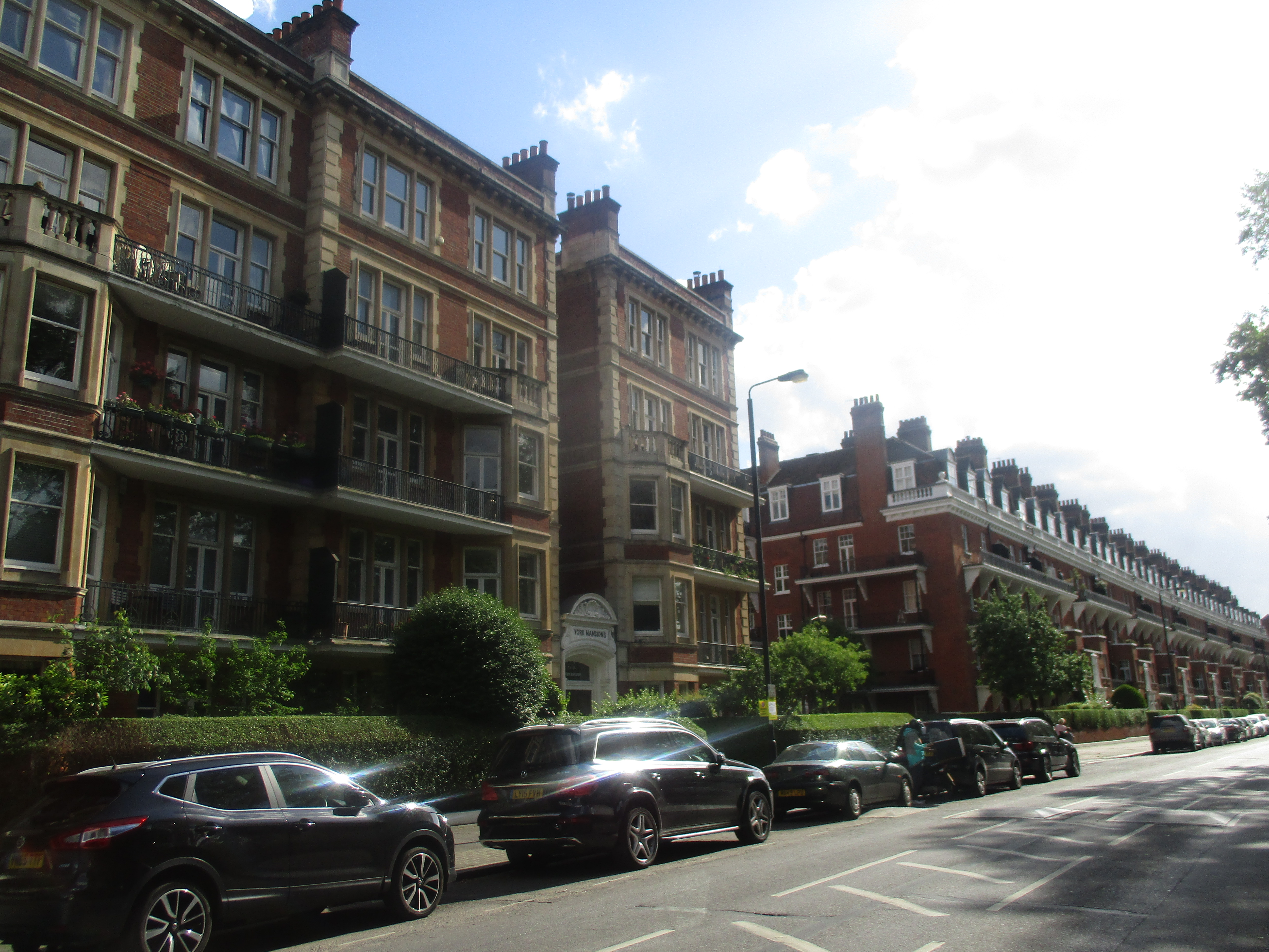 Prince of Wales Drive, York Mansions.